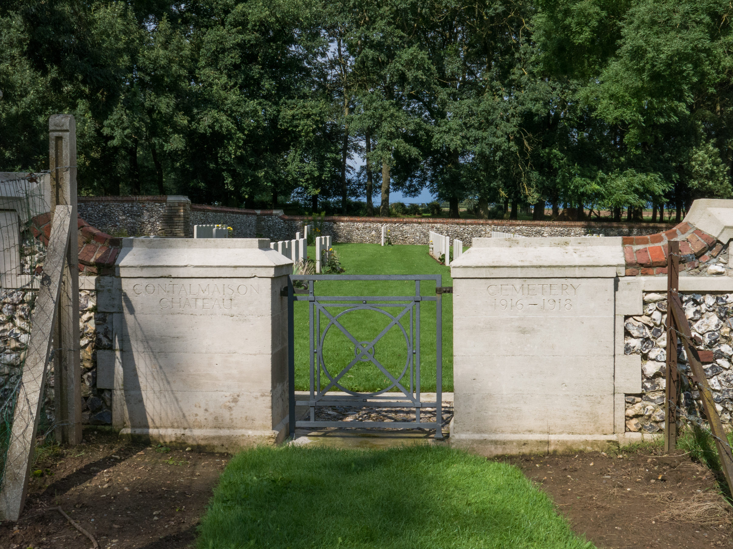 Contalmaison Chateau Cemetery